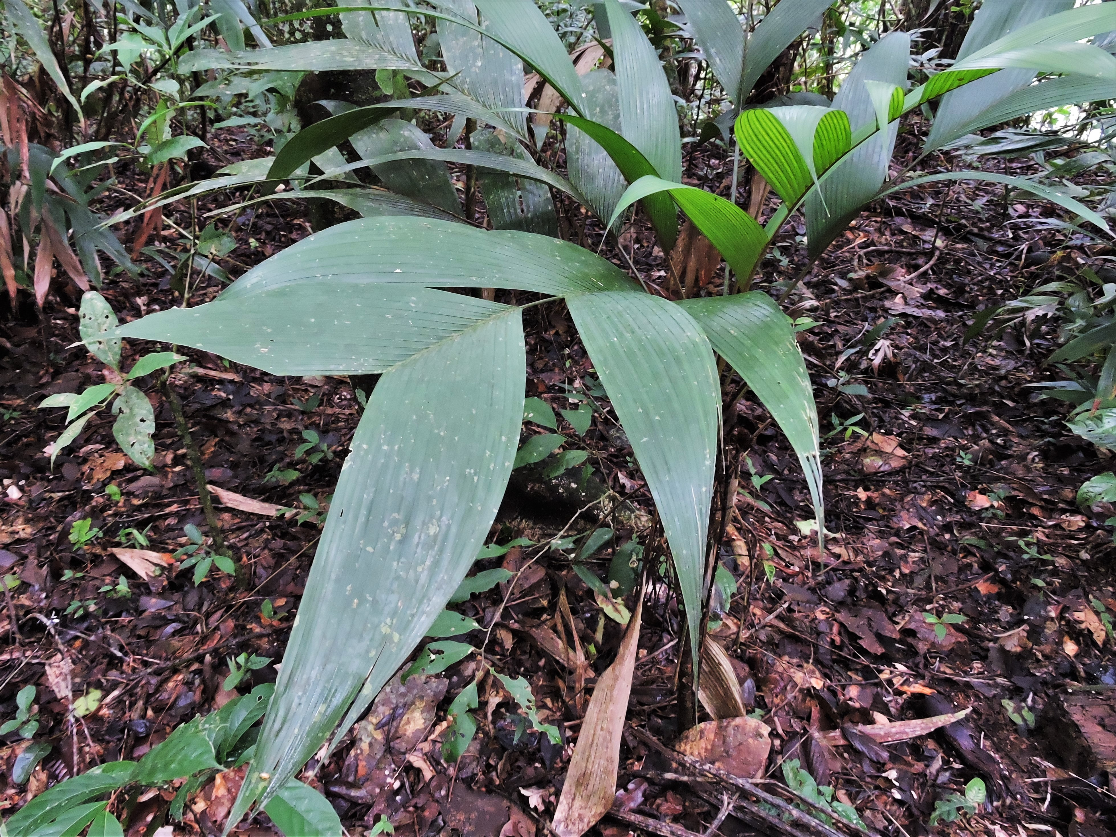 Hoja de Geonoma deversa (Jatata) en el Parque Nacional Madidi - Bolivia (Chalalan Albergue Ecológico). La Jatata es una palmera tropical de "Pie de Monte" que se emplea para la elaboración de "paños de jatata" con los cuales se construyen techados en la Amazonia boliviana y en otros países. Es muy empleada por los pueblos Uchupiamona, T´simane, Mosetene y Tacana, pero también en casas y otros inmuebles.